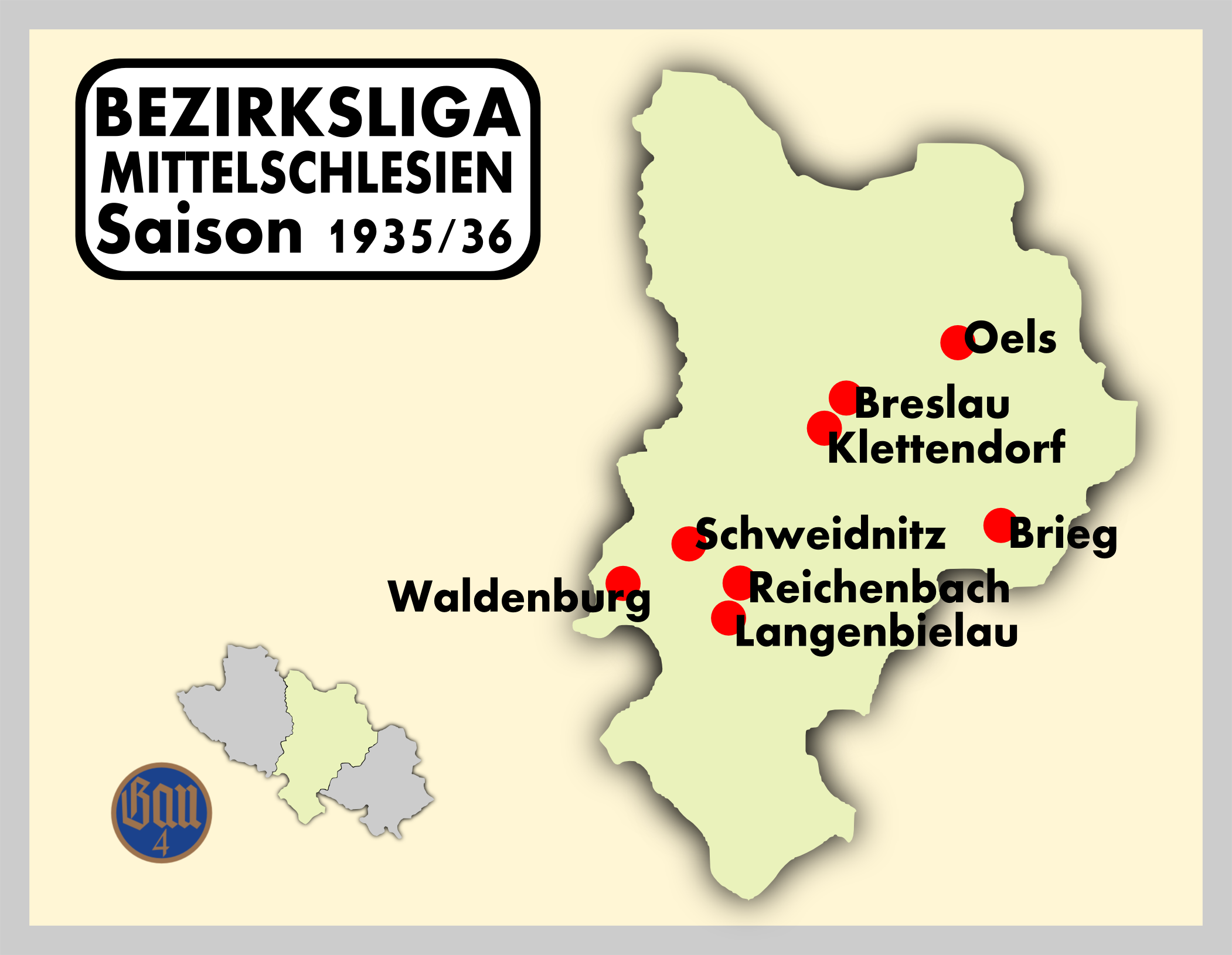 Spielorte der Bezirksliga Mittelschlesien 1935/36.